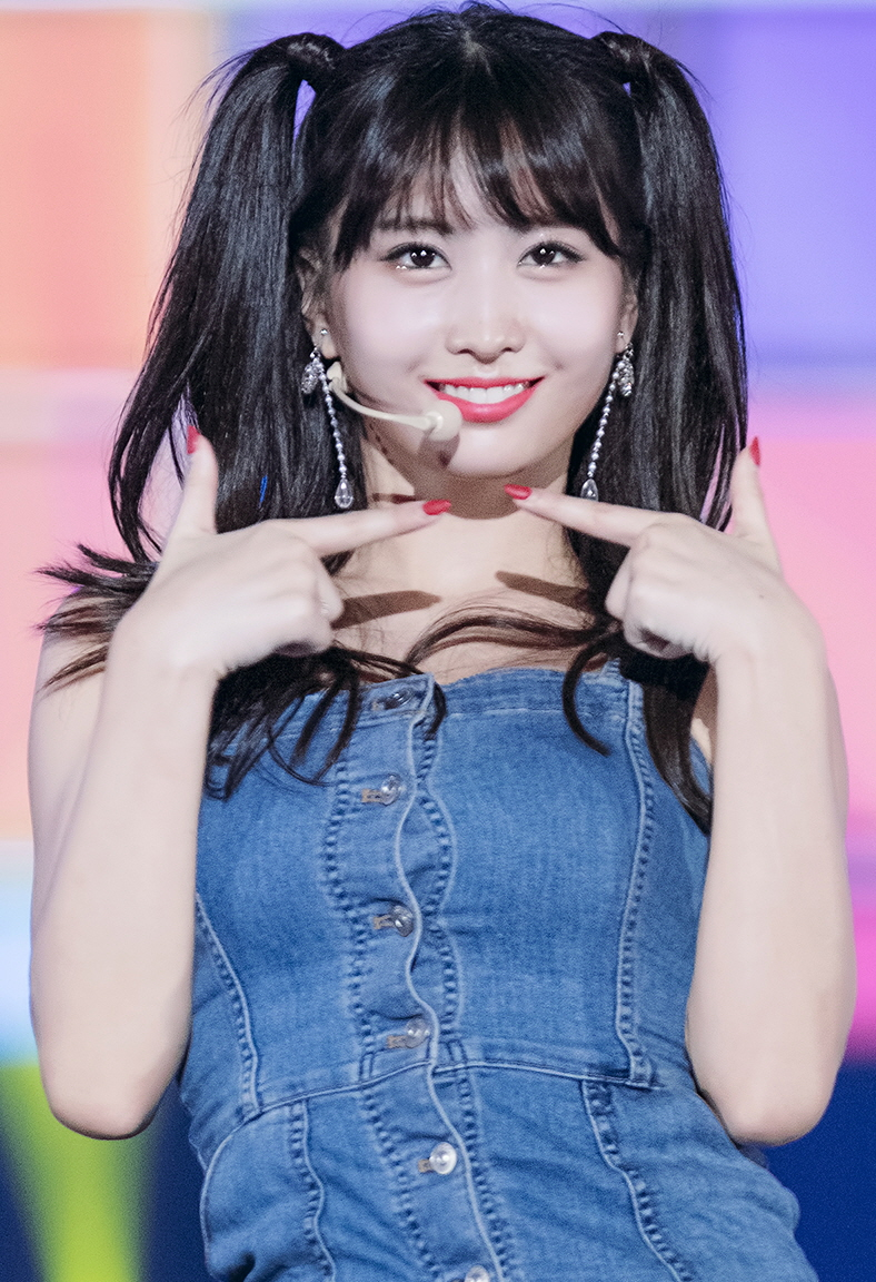 180717 열린음악회 트와이스